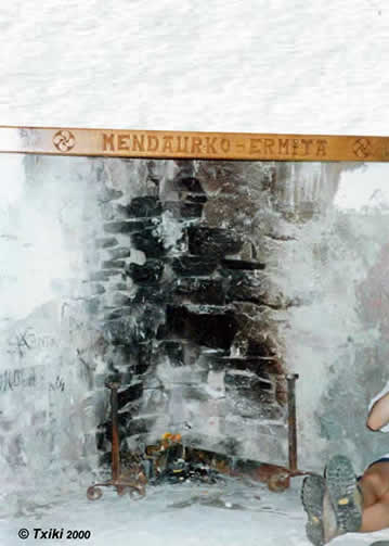 Foyer attenant à la chapelle de la Trinité à Mendaur Pyrénées).